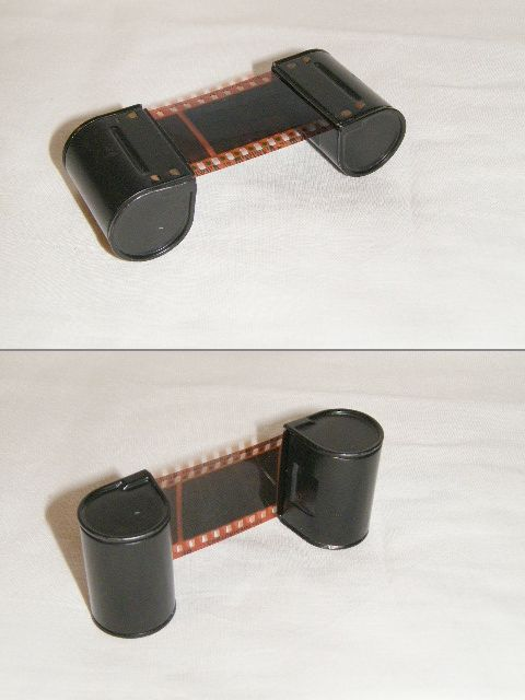 Кассета Рапид фотоаппаратов Смена-рапид и Зоркий-12